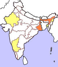 Kartorna bygger på resultat i senaste delstatsval (Juni 2004). Rött betyder att partiet deltar i delstatsregeringen, orange att partiet vann mandat i senaste delstatsvalet och gult att partiet hade lanserat kandidater men utan att vinna mandat. Kartorna tar inte hänsyn till avhopp, partifusioner och fyllnadsval under den ordinarie mandatperiodens gång. Gjord av Soman.